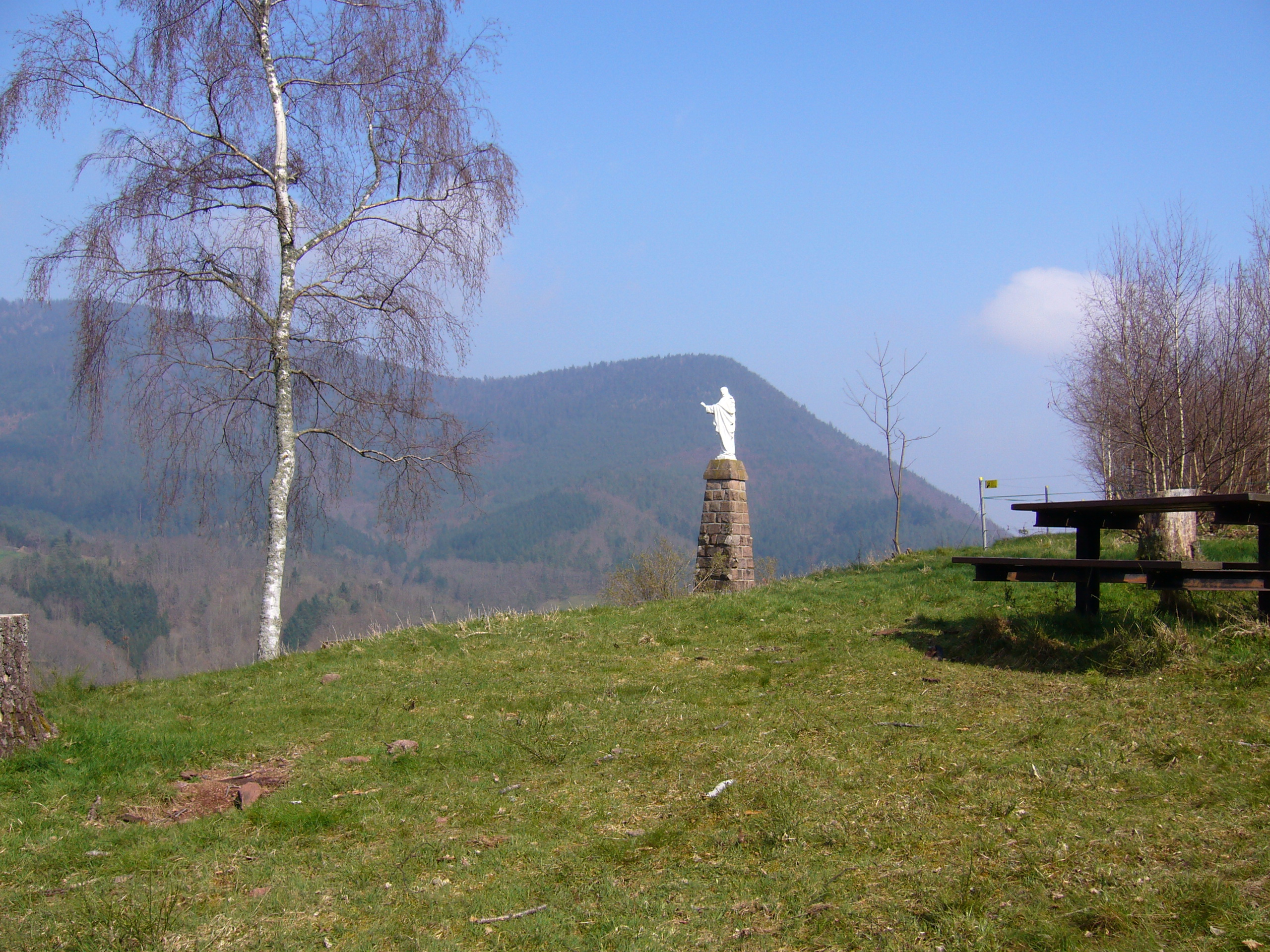 Statue du Sacré Coeur sur la colline du Rain de l'Anneau